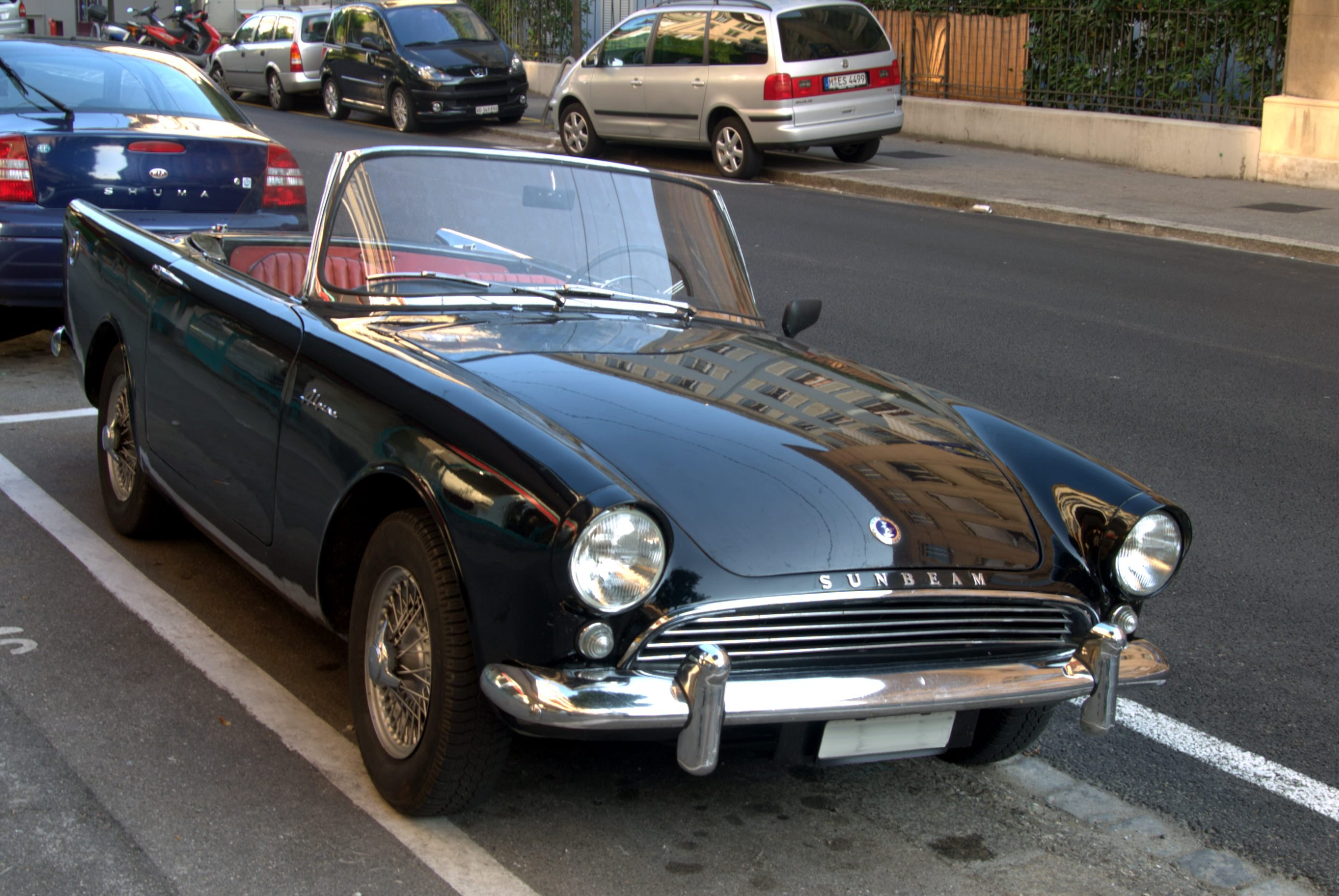 La Sunbeam Alpine Série II Sport, conduite par James Bond dans James Bond 007 contre Dr No pour se rendre chez Mlle Taro, prise en chasse par les Three Blind Mice.